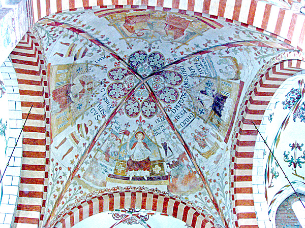 Kalkmalerier i Sct. Bendts Kirkei i Ringsted, Denmark